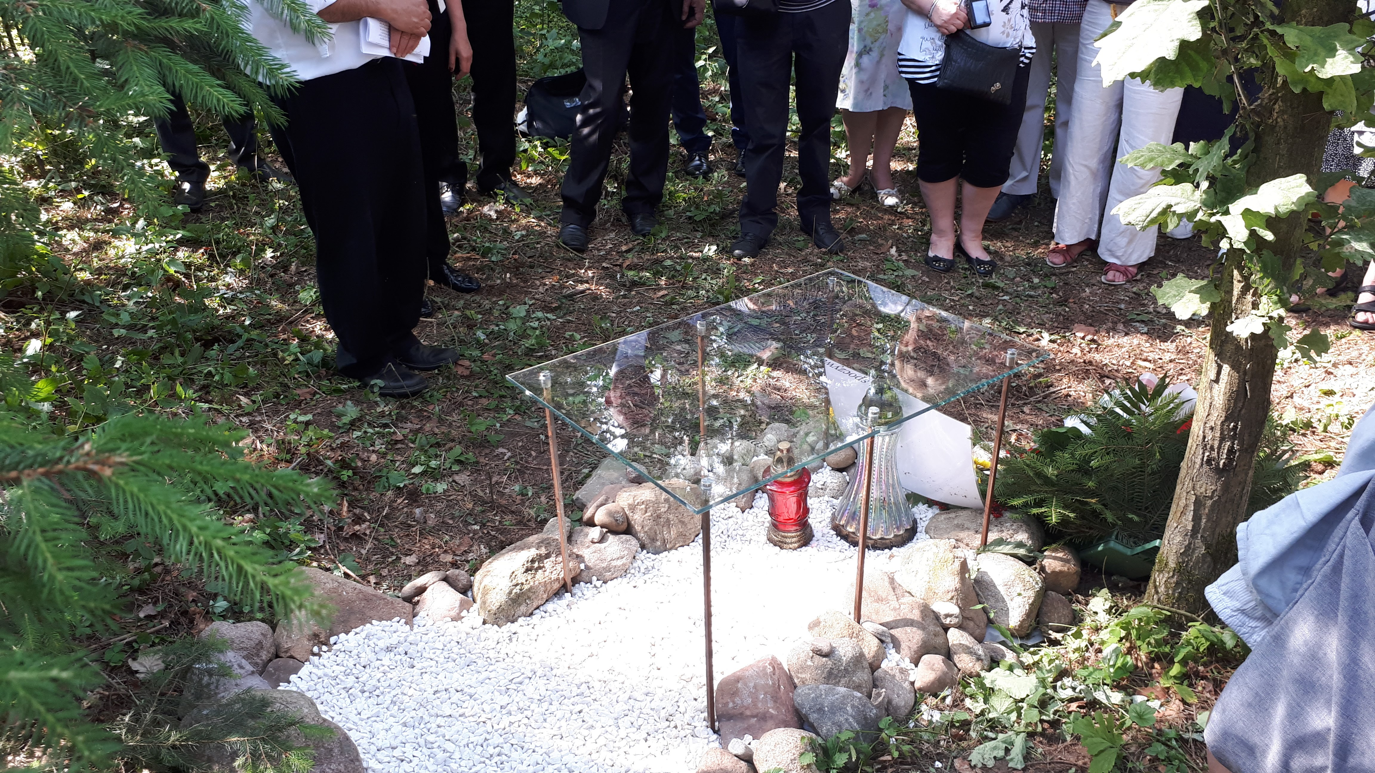 Upamiętnienie miejsca mordu Żydówek z majątku Bzury w okolicach Szczuczyna